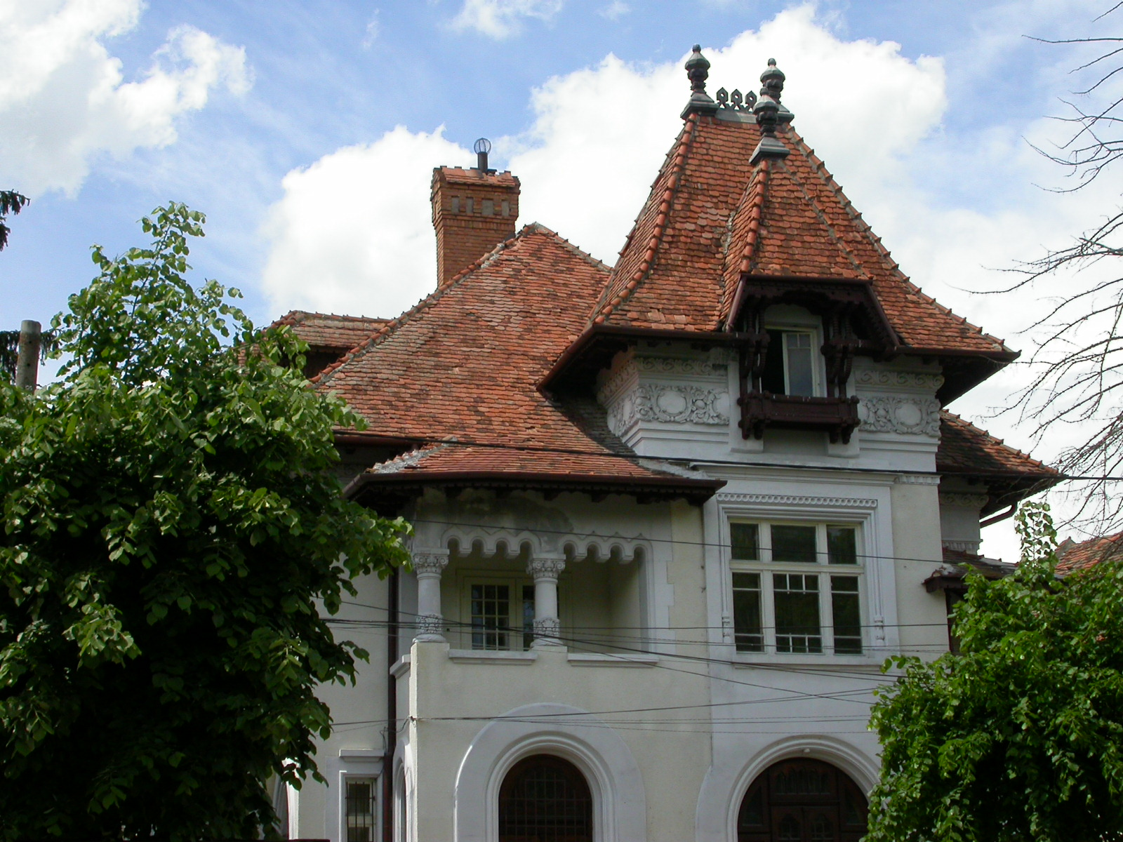 Ansamblul urban "Zona de nord a orașului"